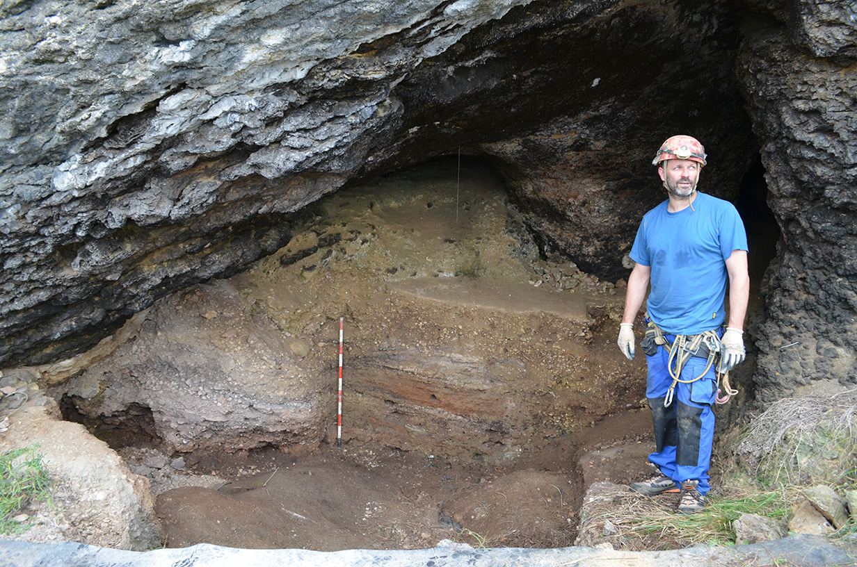 Antzoriz I / Santa Katalina kobazuloko aztarnategia (Lekeitio). ADES Espeleologia Elkarteko kide bat 2015eko egokitze lanetan.